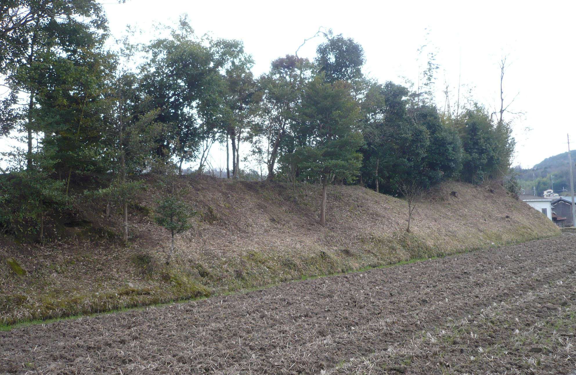 土塁跡